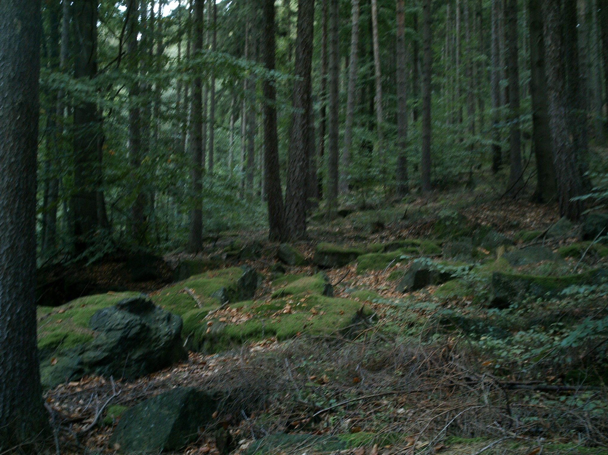 Ślężański Park Krajobrazowy - Ślęża